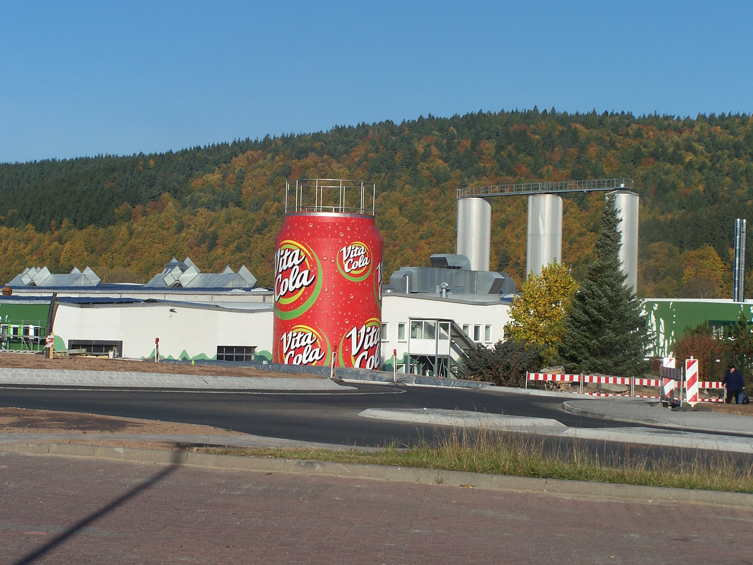 Das Betriebsgelände der Firma Thüringer Waldquell in Schmalkalden, Stadtteil Aue.